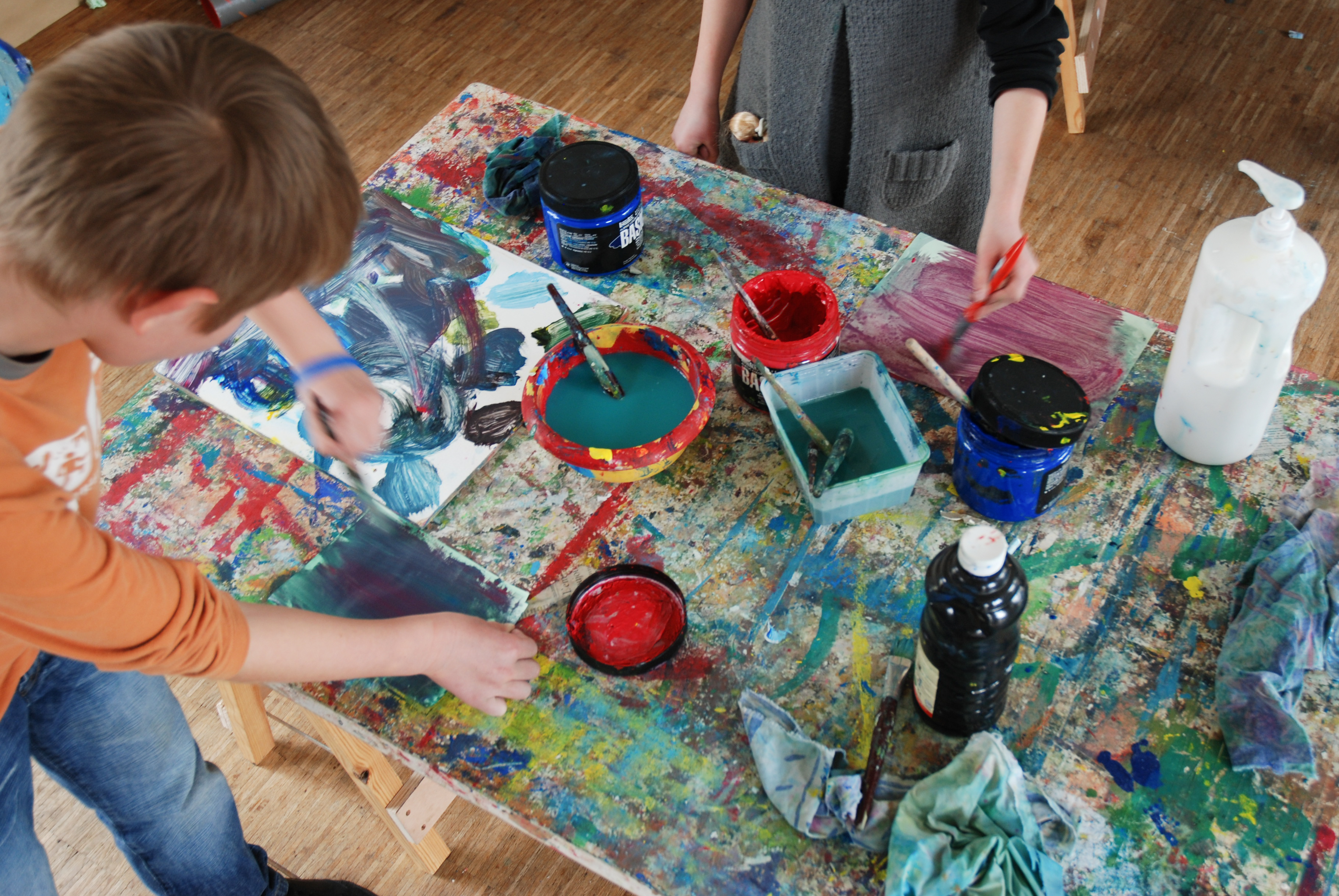 Des ateliers pour les petits et grands